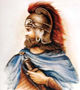 Վարդան Մամիկոնյան